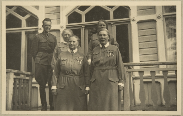 Lotta Svärd -järjestön keskusjohtokunnan jäseniä Tuusulassa 1930-luvulla, edessä järjestön puheenjohtaja Fanny Luukkonen ja lääkintäjaoston päällikkö Suoma Loimaranta-Airila. Museoviraston kuvakokoelmat.